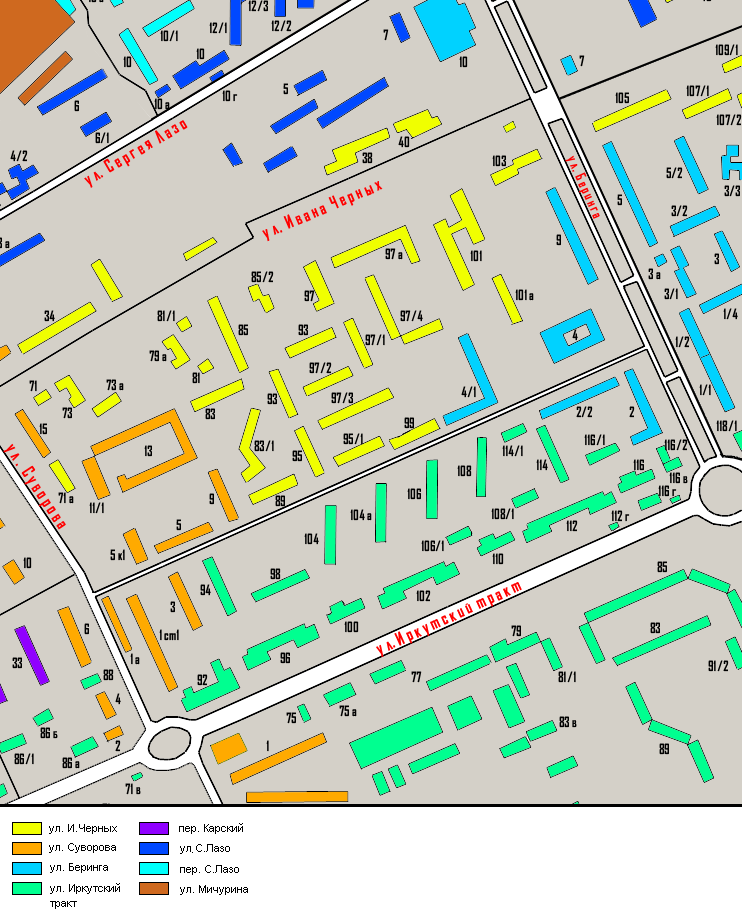 Карта 2-го микрорайона г.Томска